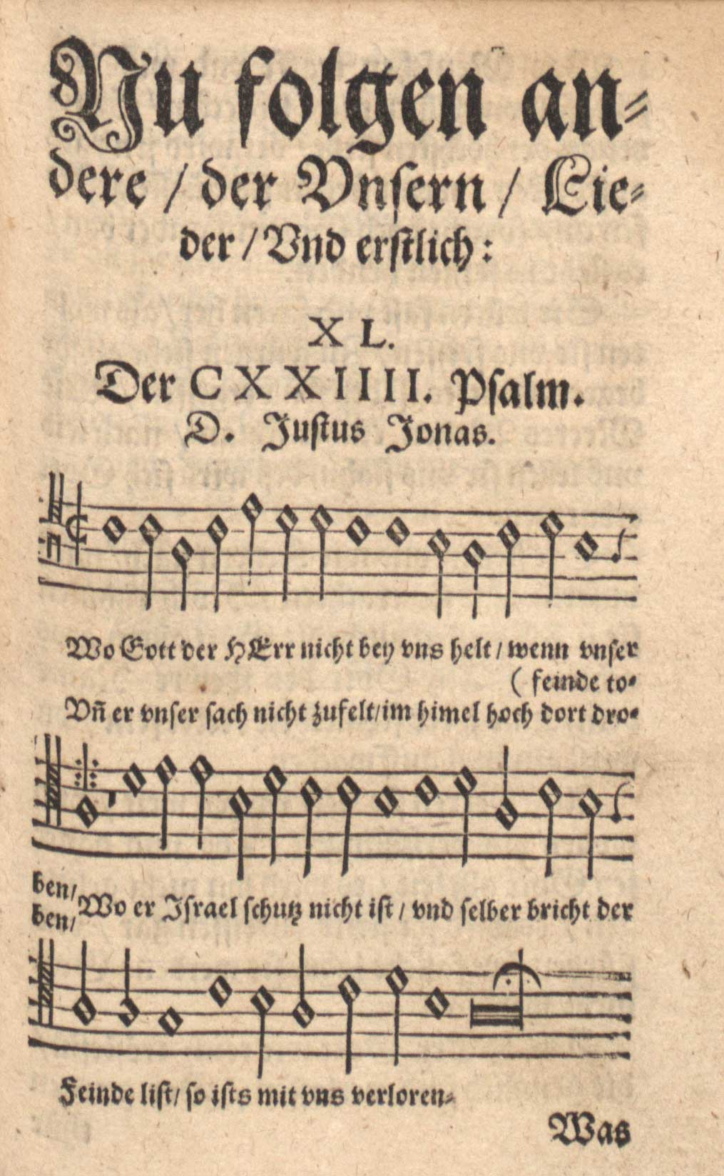 Psalm 124. von Justus Jonas "Wo Gott der herr nicht bey uns helt" aus Geystliche Lieder Leipzig 1563 gedruckt bei Ernst Vögelin (Leipzig)